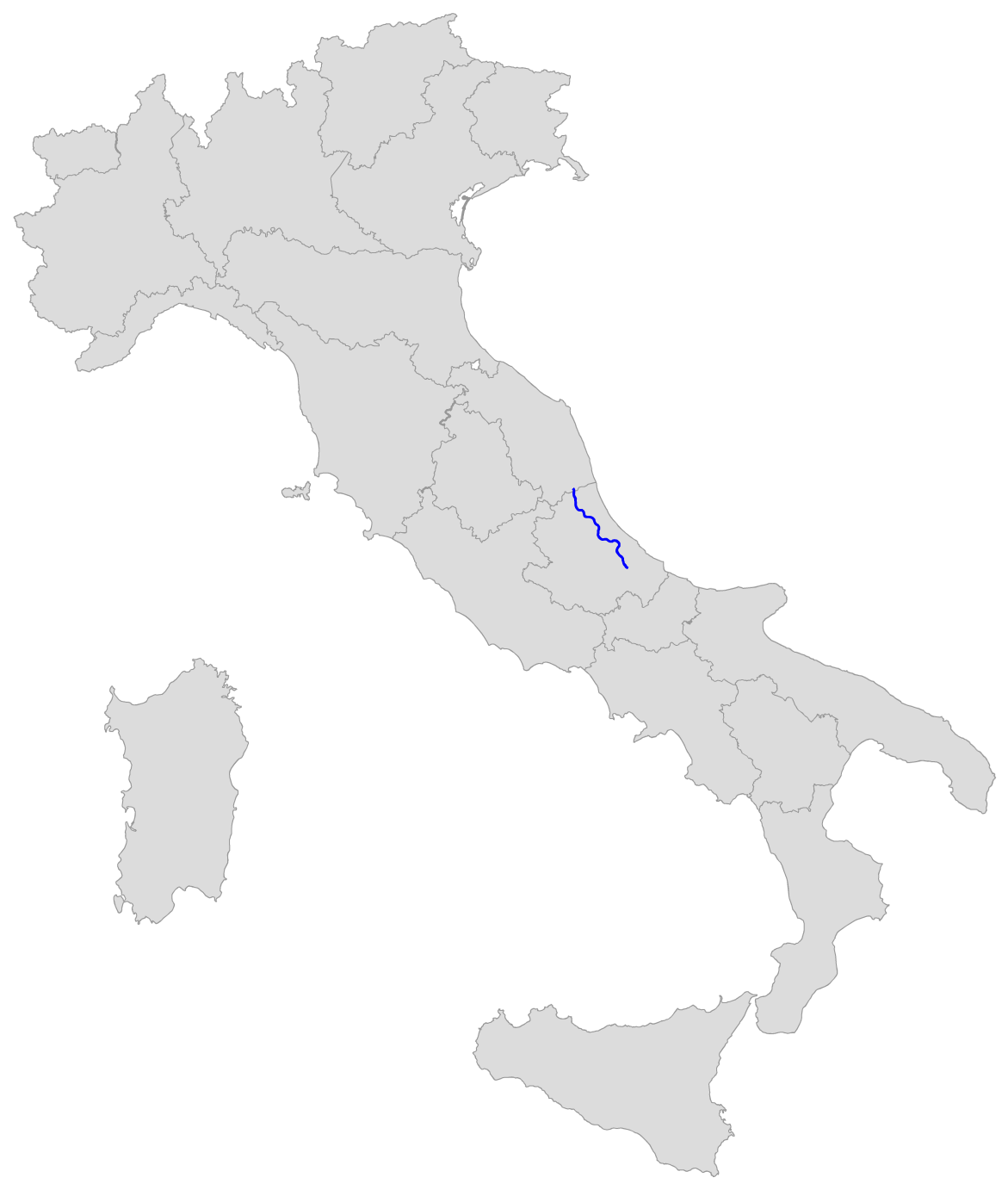 Percorso della SS 81 Piceno Aprutina